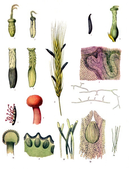 Mutterkornpilz. A Roggenähre mit Sclerotien, natürl. Grösse; 1 reifes Sclerotium, desgl.; 2 Fruchtknoten mit dem Pilzmycelium bedeckt, vergrössert; 3 derselben im Längsschnitt, desgl.; 4 Fruchtknoten mit dem Anfang der Bildung des clerotiums, desgl.; 5 dieselbe Figur im weiteren Entwicklungsstadium, desgl.; 6 Letztere Figur im Längsschnitt, desgl.; 7 Mycelium mit Conidienträgern und Conidien, desgl.; 8 Sclerotium mit den Fruchtträgern, desgl.; 9 Fruchtträger stärker vergrössert; 10 derselbe im Längsschnitt mit den Perithecien, desgl.; 11 Schnitt aus der Perithecienschicht noch stärker vergrössert; 12 Einzelnes Perithecium noch stärker vergrössert; 13 Sporenschläuche, desgl. (dieselben müssen am oberen Ende etwas verjüngt sein); 14 Schlauchsporen, desgl.; 15 Keimende Schlauchsporen.